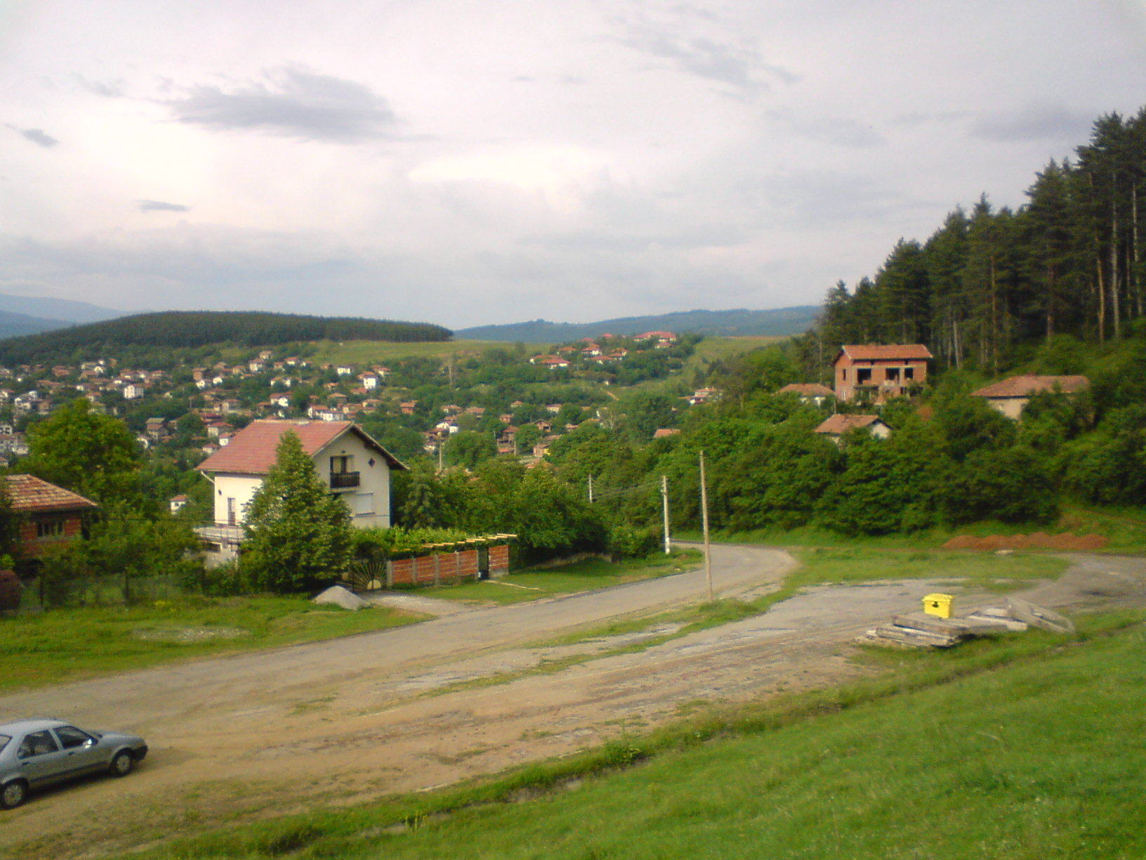 Село Дрен